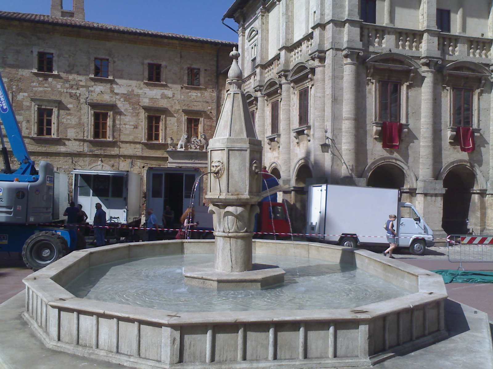 Montepulciano, la fontana di Piazza Grande vista nel film The Twilight Saga: New Moon.